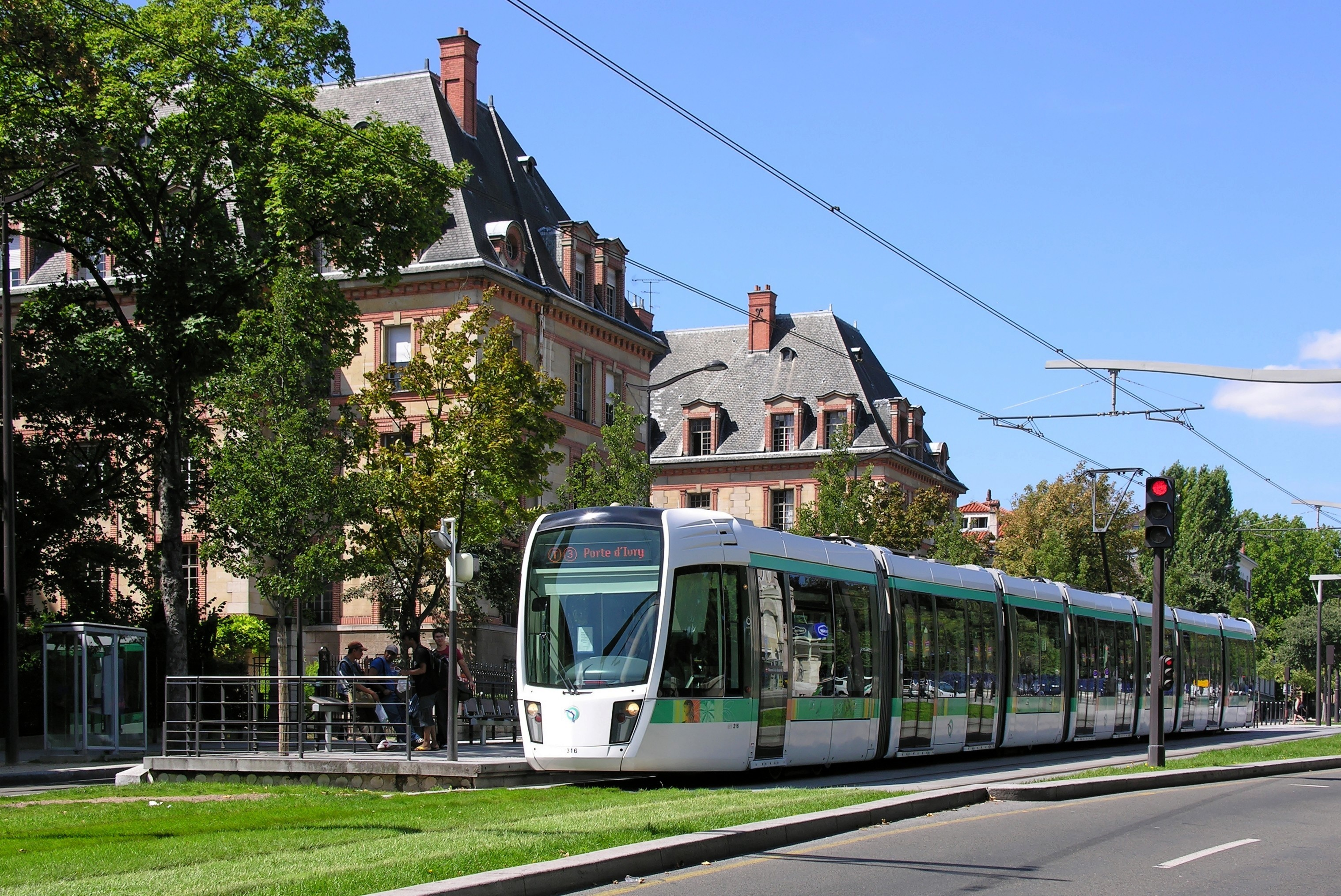 Le tramway devant la cité universitaire de Paris